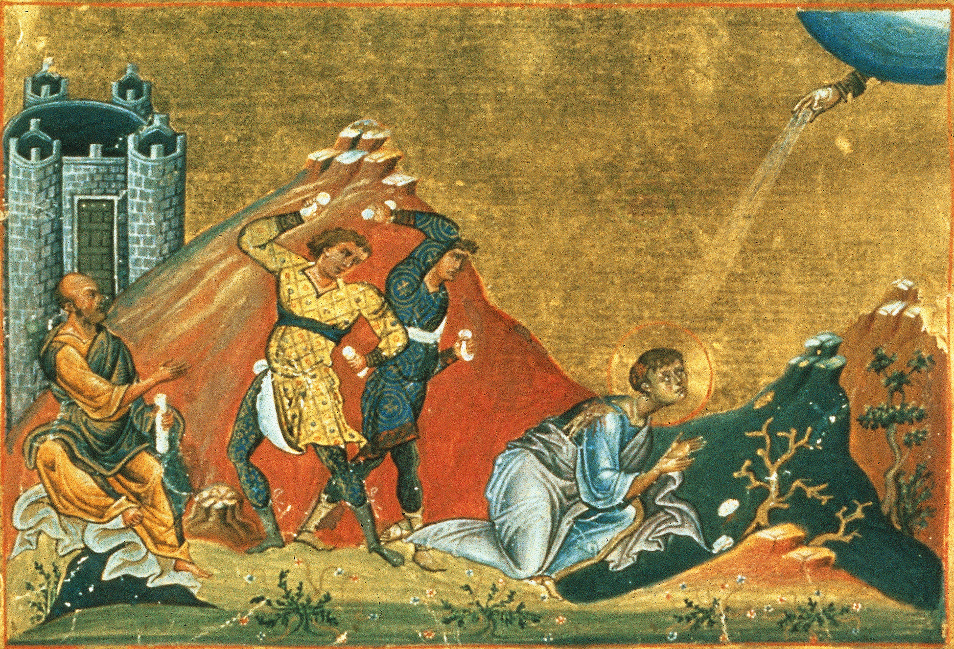 Мученическая кончина архидиакона Стефана. Миниатюра Минология Василия II. Константинополь. 985 г. Ватиканская библиотека. Рим.